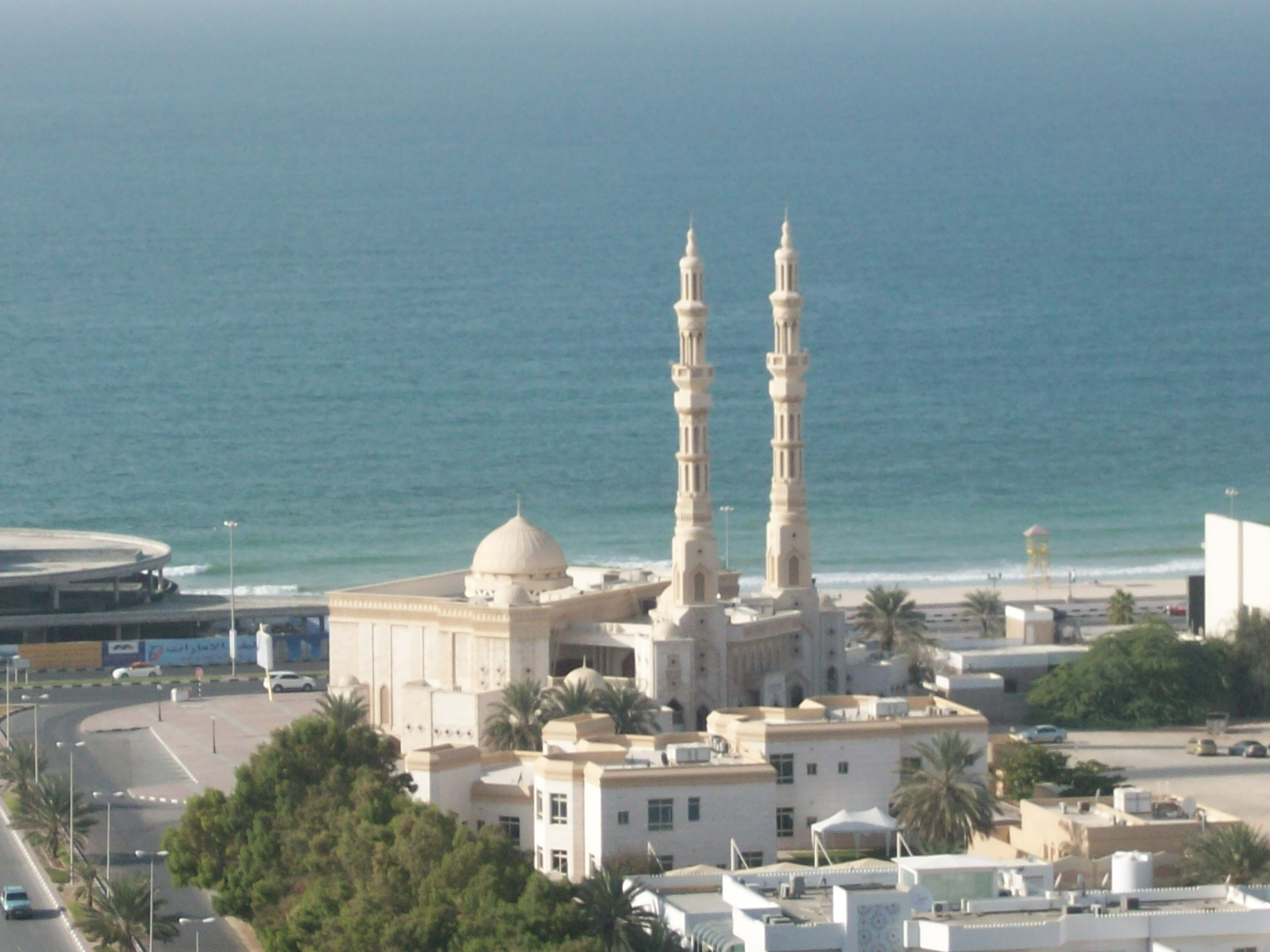 Ajman corniche mosque.